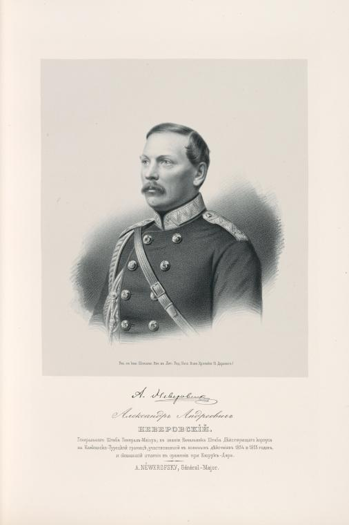 генерал Александр Андреевич Неверовский